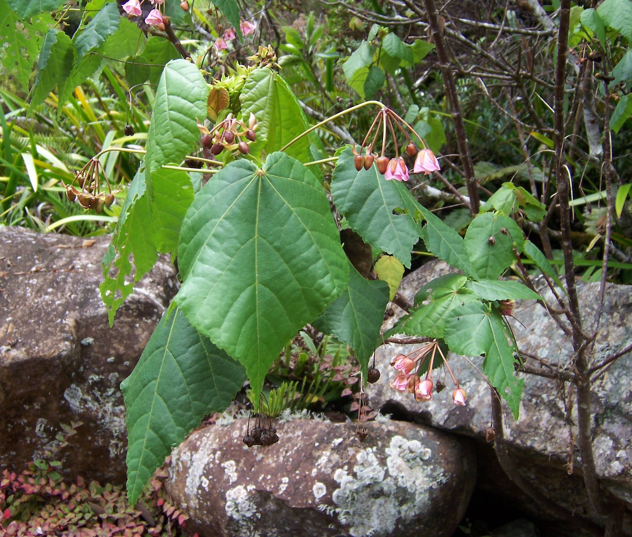 Dombeya elegans (Malvaceae/Sterculiaceae) Photo : B.navez - 31 JAN 2006 - Réunion island (Forêt de Bébour)